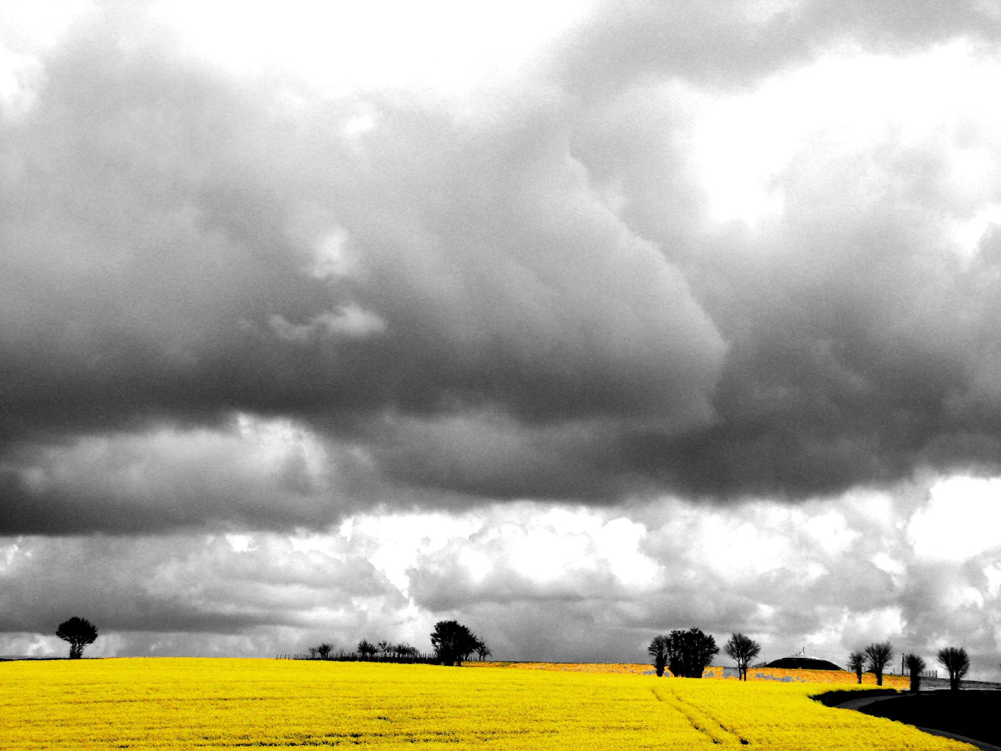 Rape seed and sky 03A